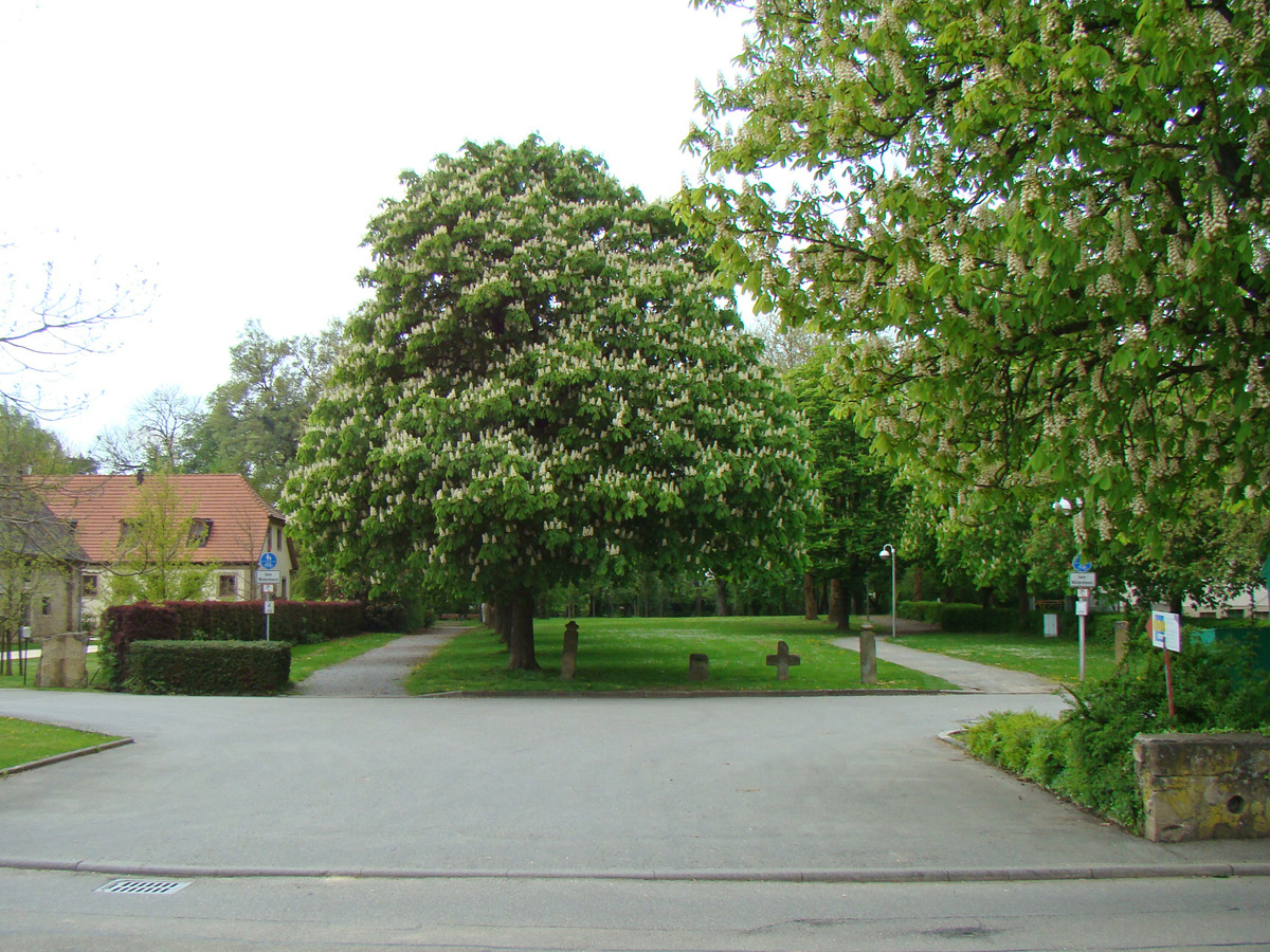 Schlosspark in Bonfeld, in der Bildmitte der Standort des einstigen Unterschlosses